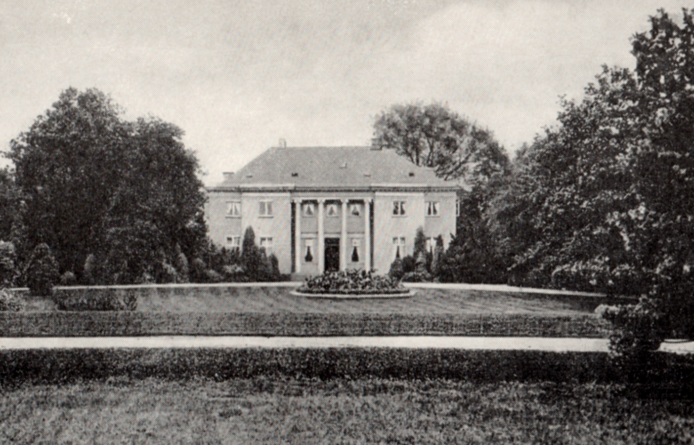 Geburtshaus des Reichskanzlers Bernhard von Bülow an der Elbchaussee.